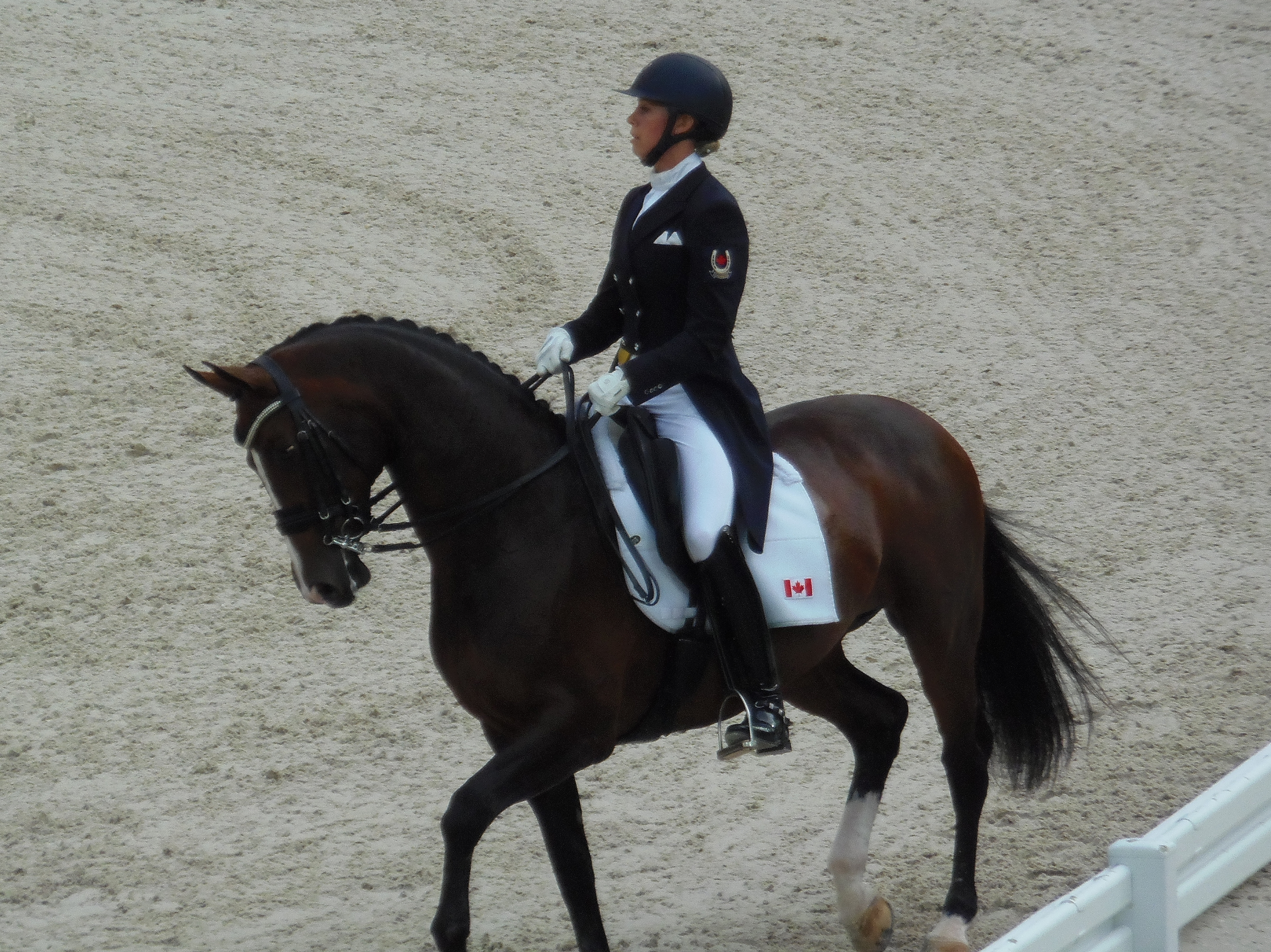 Megan Lane en selle sur Caravella lors des Jeux équestres mondiaux, le 26 août 2014 au stade d'Ornano à Caen (Normandie, France).